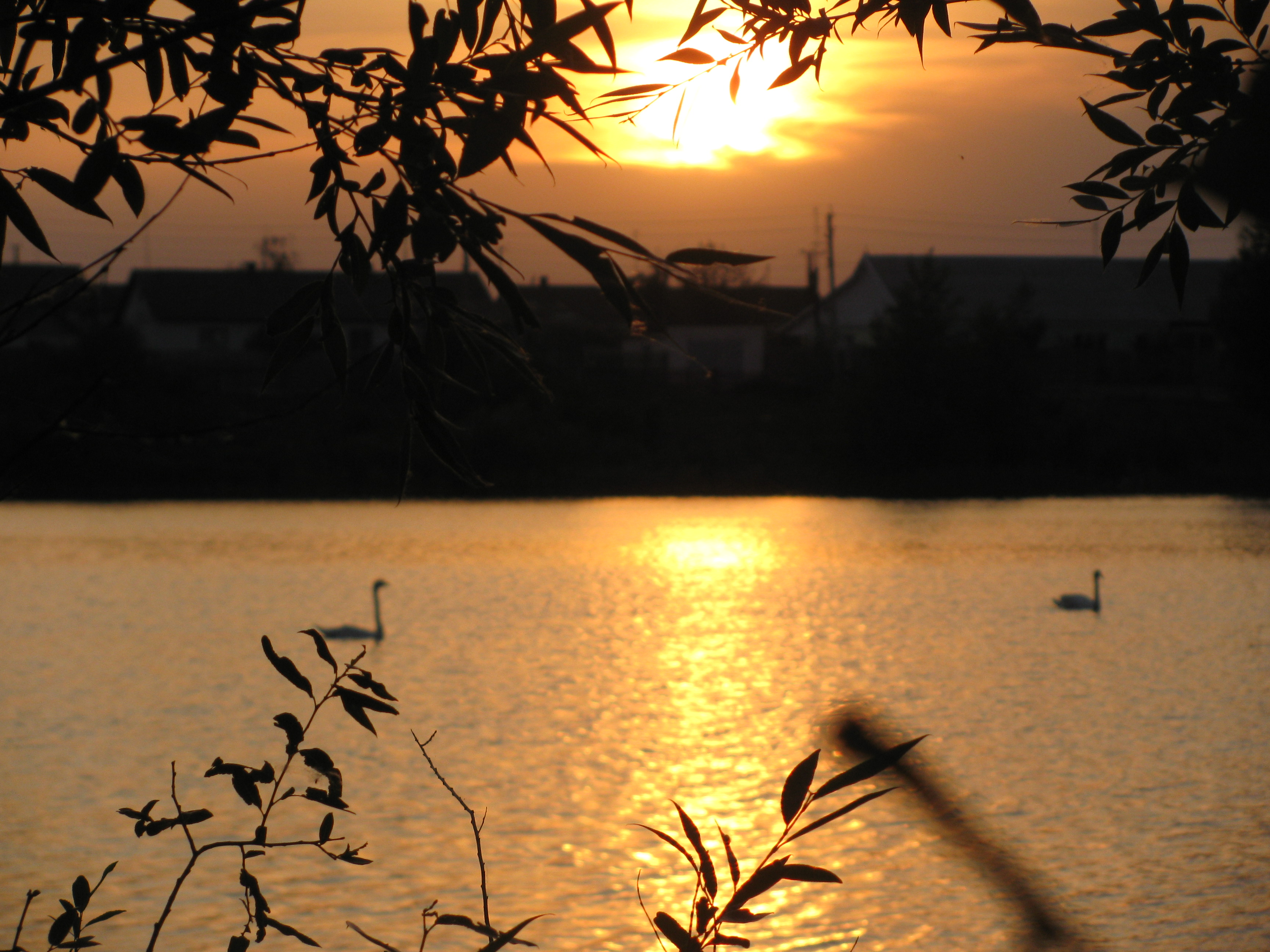 Лиман - искусственный водоём на окраине села Нижняя Добринка Жирновского района.